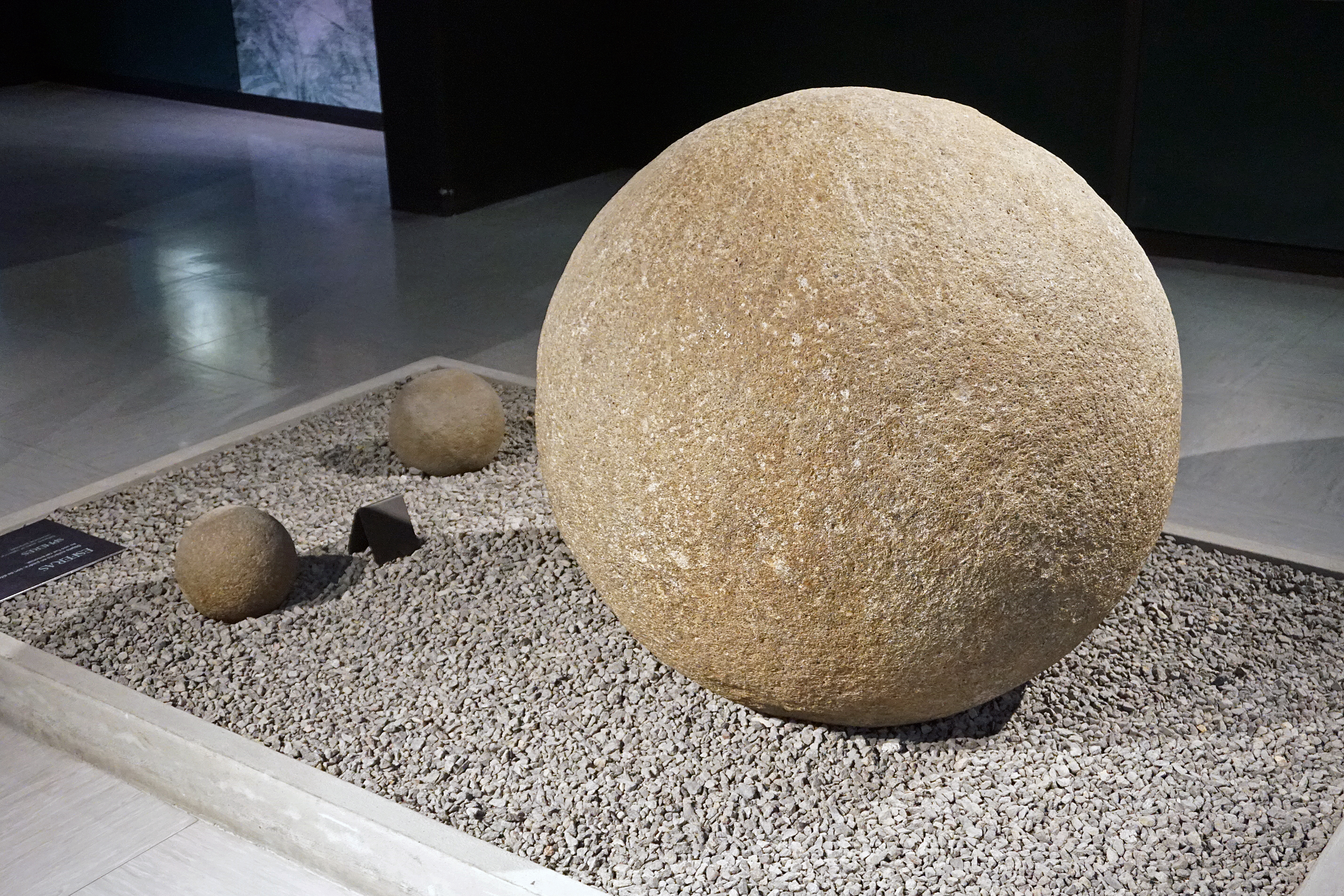 Esferas de piedra de Diquís en el Museo de Jade del INS, Costa Rica